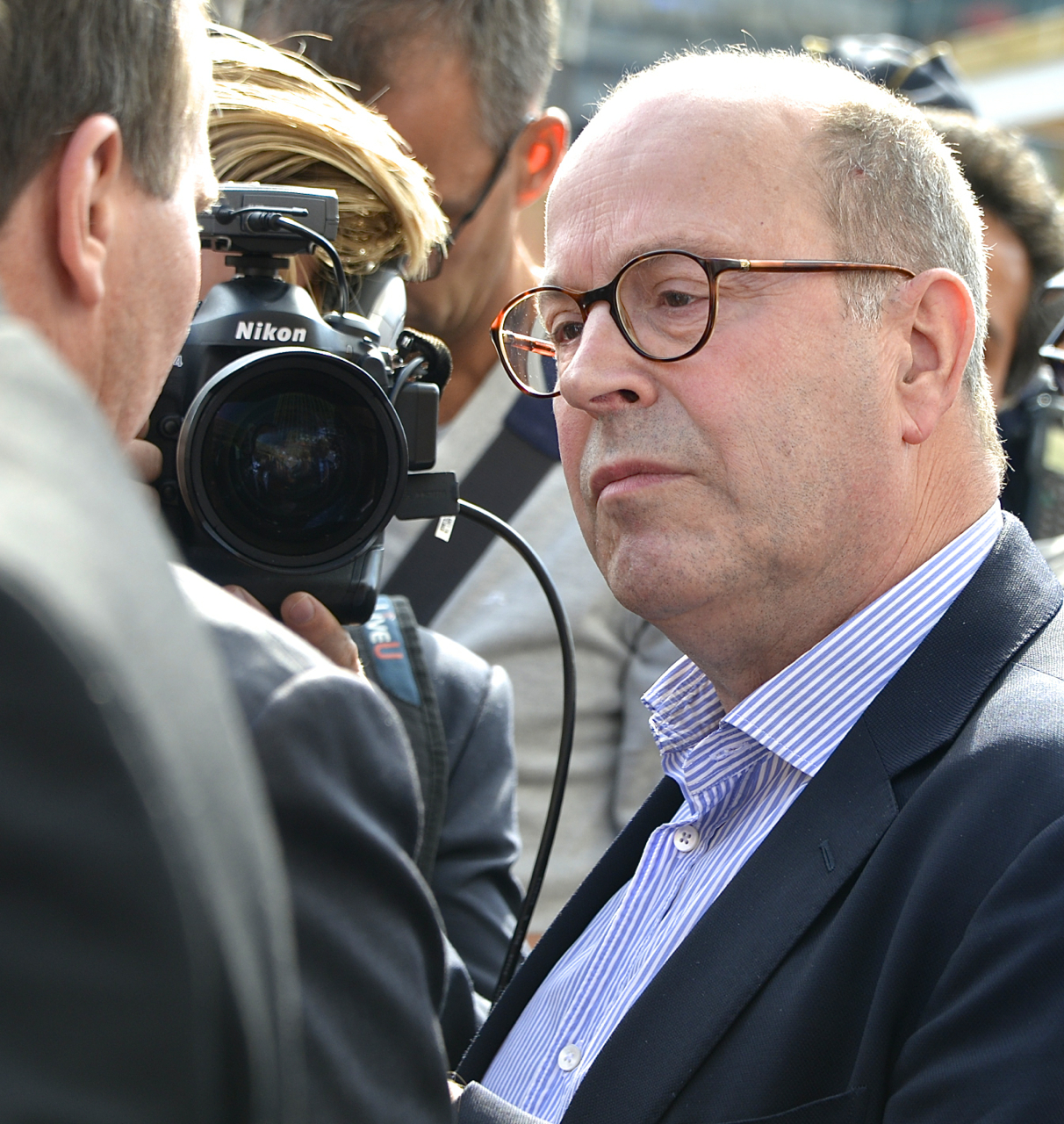 Jan Scherman intervjuar Stefan Löfven på valdagen den 14 september 2014.